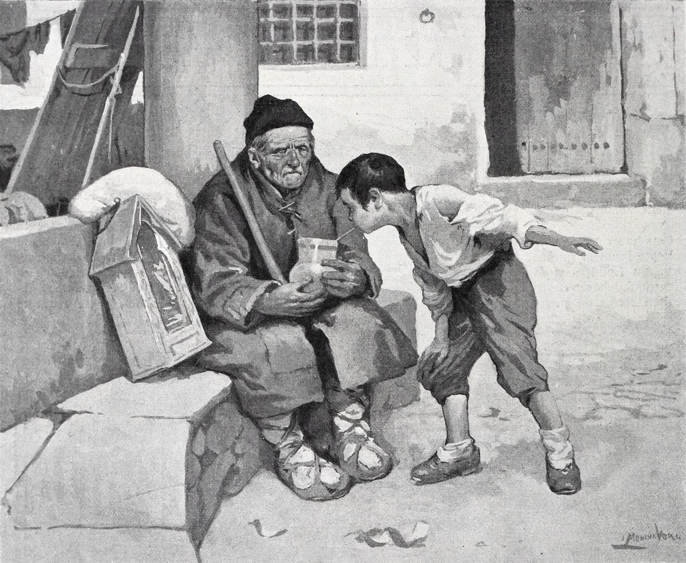 La ruta del Lazarillo.